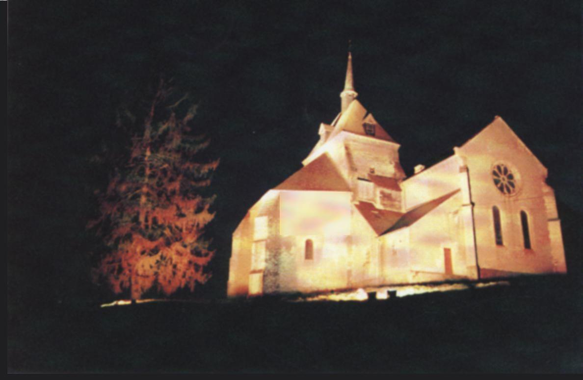 Eglise de saint-parize-le-chatel (58,FRANCE)